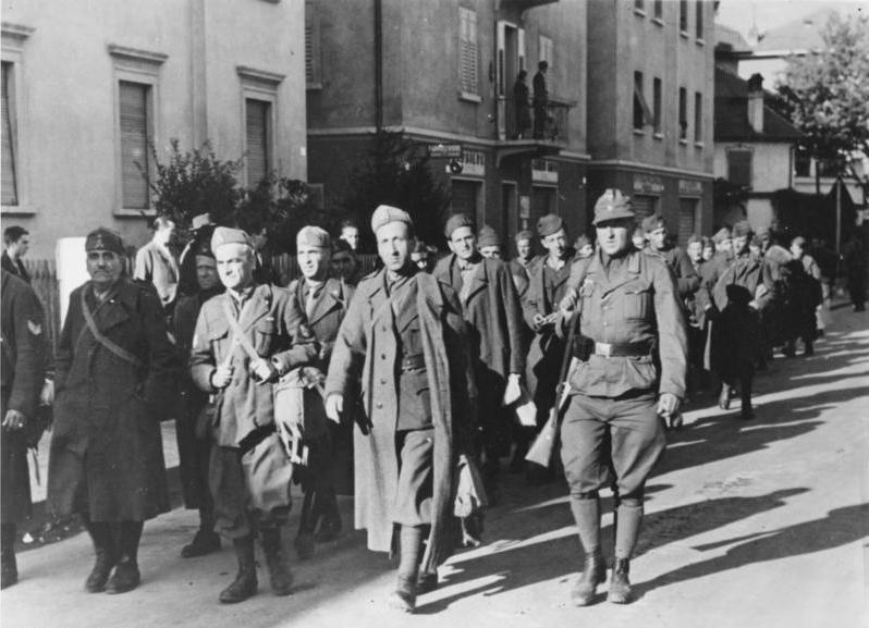 II. Weltkrieg 1939 - 1945 Entwaffnete Badoglio-Einheiten in den Straßen der Stadt Bozen. In Norditalien hatte der Verräter, Marschall Badoglio, zahlreiche Verbände des italienischen Heeres stationiert, um im gegebenen Augenblick den im Süden kämpfenden deutschen Truppen in den Rücken fallen zu können. Aber durch das schnelle Handeln der deutschen Führung wurde diese verbrecherische Absicht zunichte gemacht und die italienischen Truppen, die nur kurzen oder meist gar keinen Widerstand leisteten, zur Waffenstreckung gezwungen, so weit sie sich nicht an das deutsche Heer anschlossen. UBz: Die ersten entwaffneten italienischen Einheiten marschieren durch die Straßen der Stadt Bozen, nur von wenigen deutschen Soldaten bewacht, ins Sammellager. PK-Kriegsberichter Rieder, Scherl 11.9.43 [Herausgabedatum]